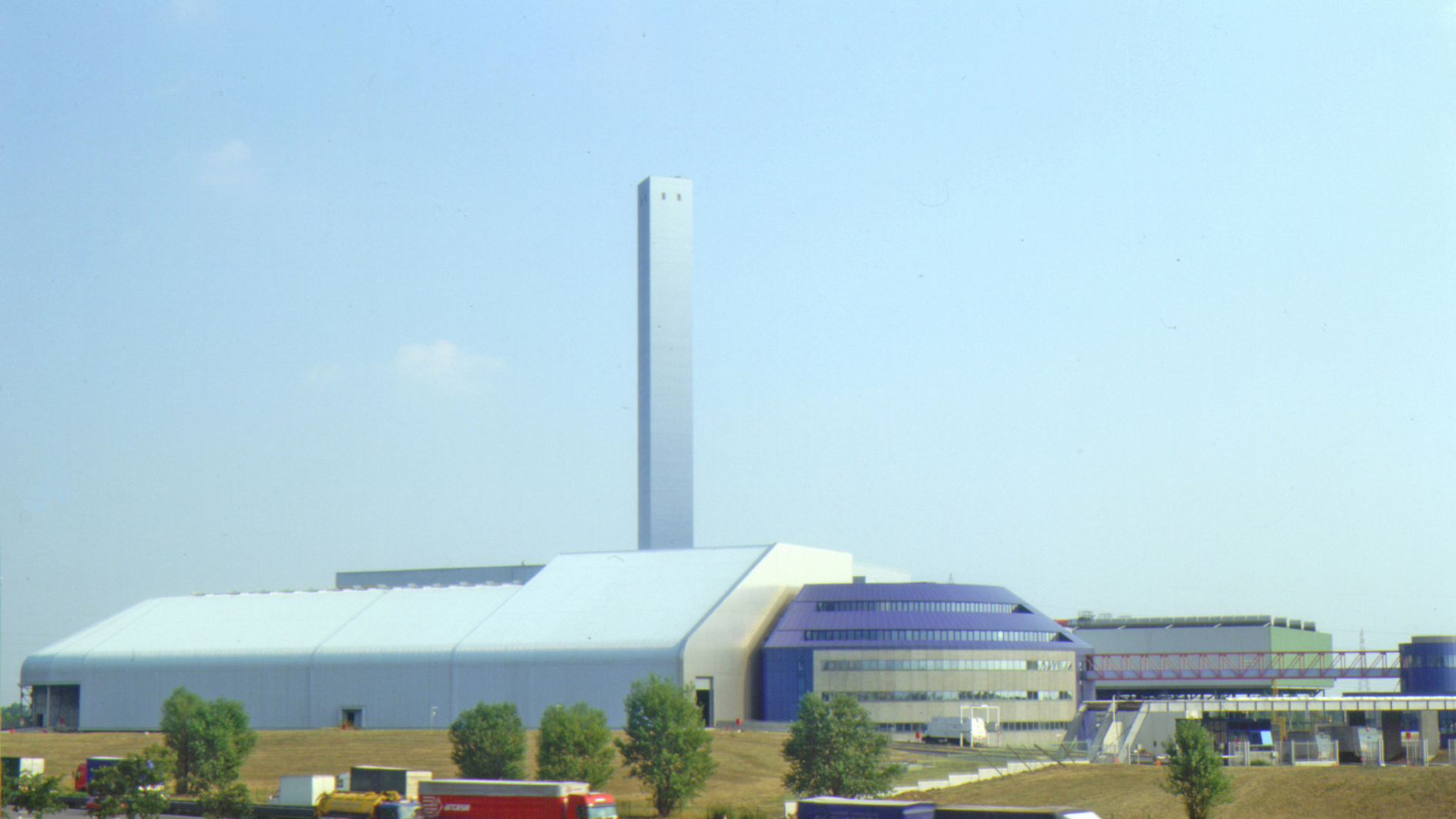 Il Termovalorizzatore di Brescia, con la ciminiera colorata da Tornquist